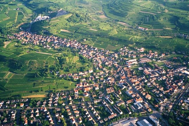 Fotograf: Luftfahrer = Norbert Blau Beschreibung: Luftbild von Bötzingen aufgenommen bei einer Ballonfahrt Quelle: Selbst fotografiert im August 2002 Weitere Luftbilder von Bötzingen